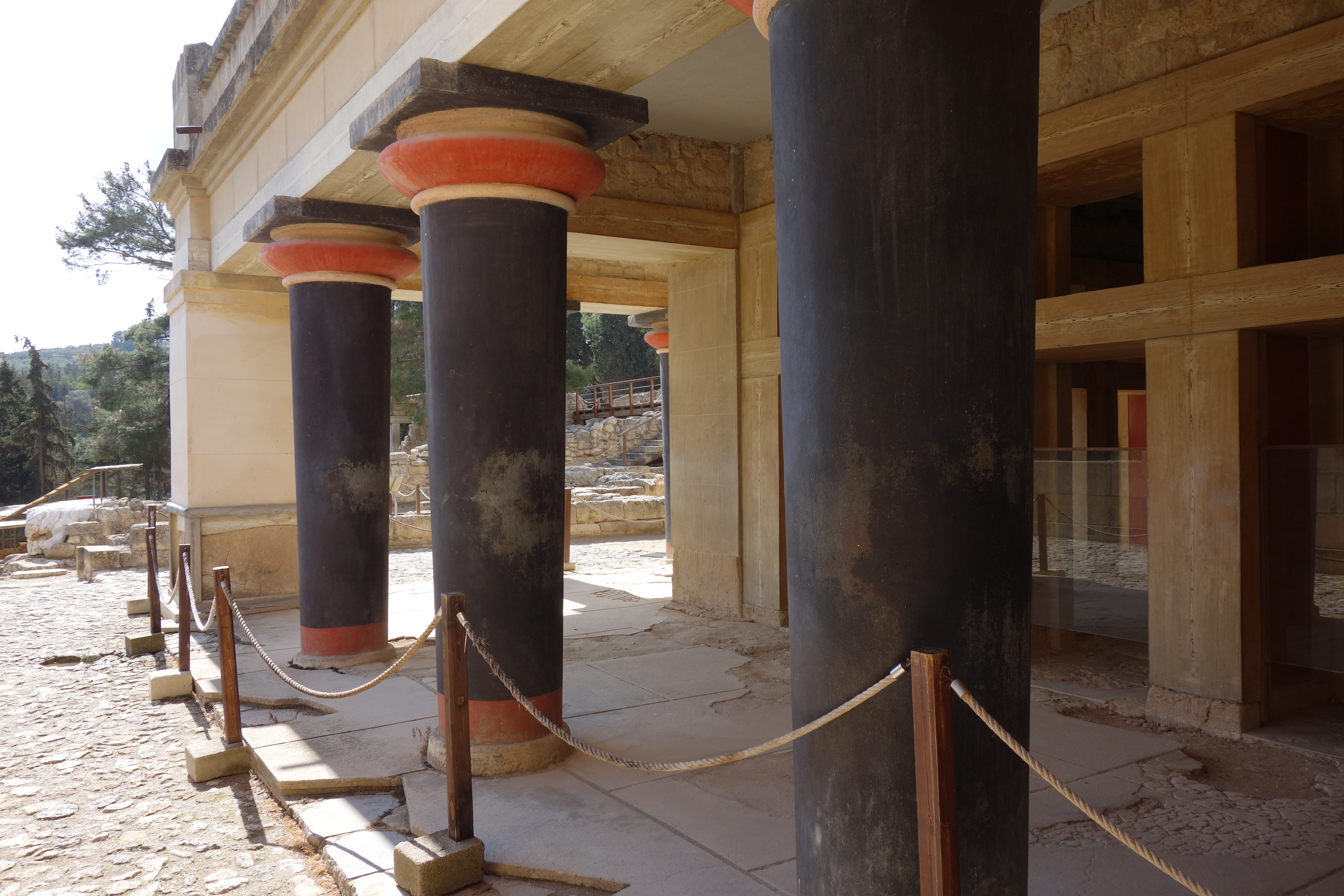 ミーノータウロス伝説の舞台となったクノッソス宮殿